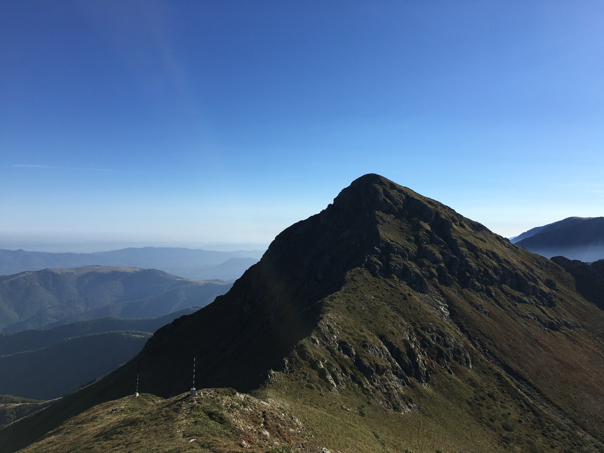 Изглед към Голям Купен от съседния до него Малък Купен